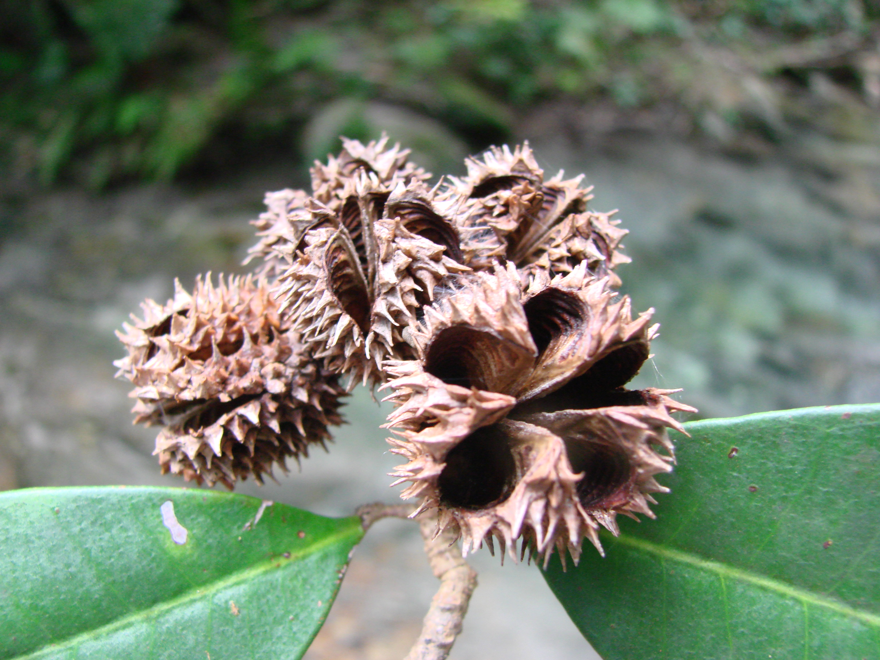 Esenbeckia grandiflora - Rutaceae Cavalcante - GO - Brasil